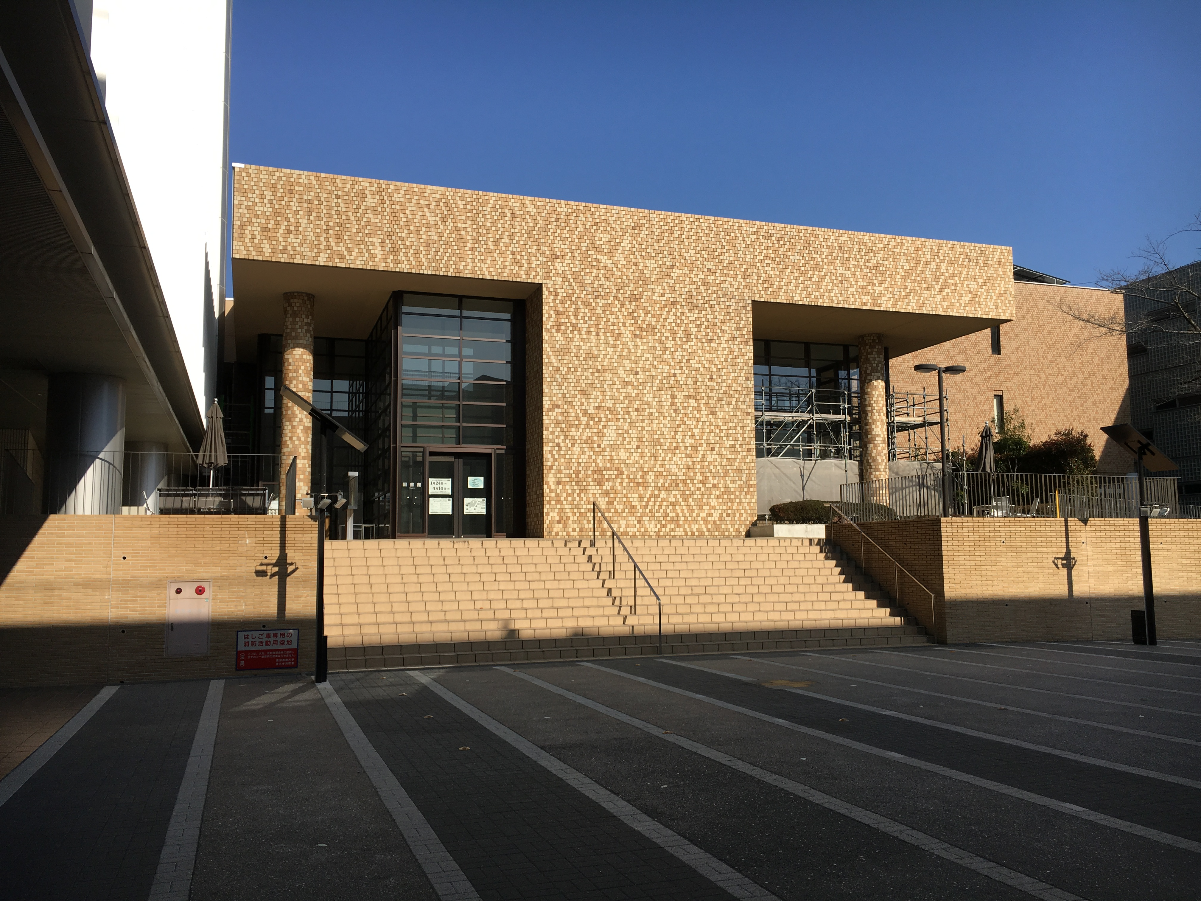 愛知淑徳大学図書館（長久手キャンパス）2016年3月撮影